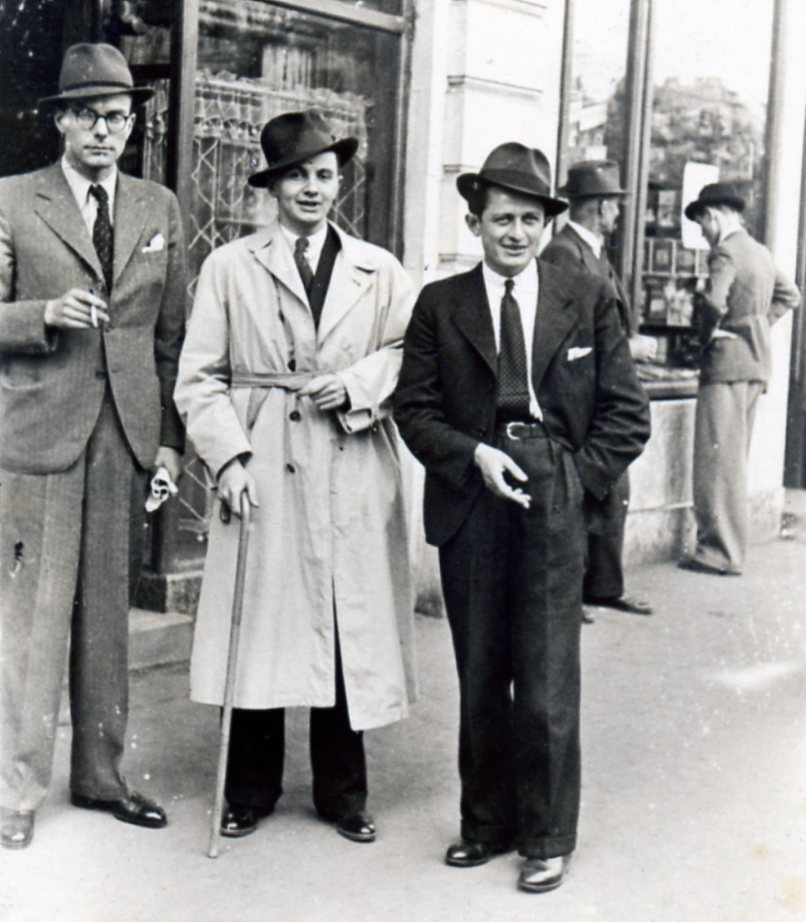 Kazimierz Badeni (po lewej) Adam Romiszowski (w środku) Zdzisław Kisielewski (po prawej) w Krakowie lata 30